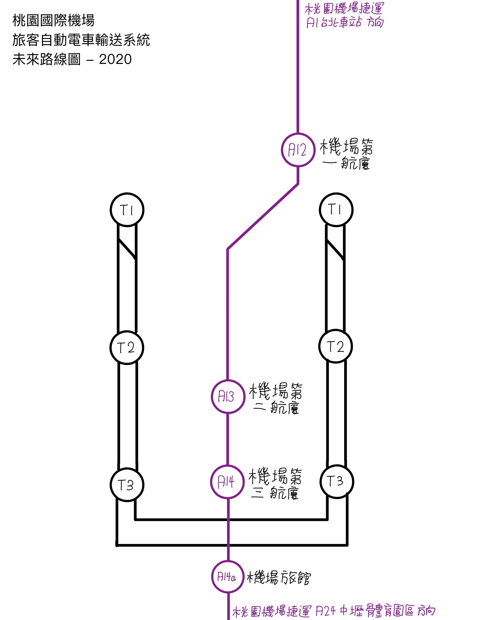 中文（台灣）: 桃園國際機場旅客自動電車輸送系統未來路線圖 - 2020